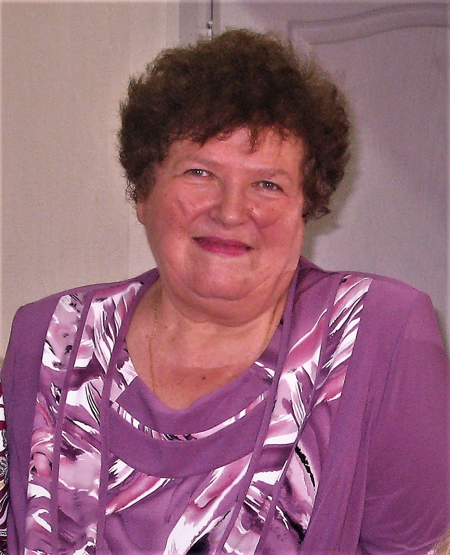 Вчений і педагог Л.В.Старовойт